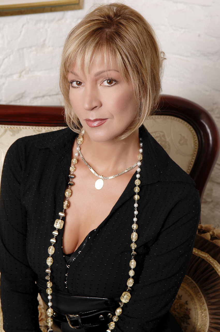 Ivana Kuzmanović. Slika sa sajta Ivane Kuzmanović, uz njenu saglasnost